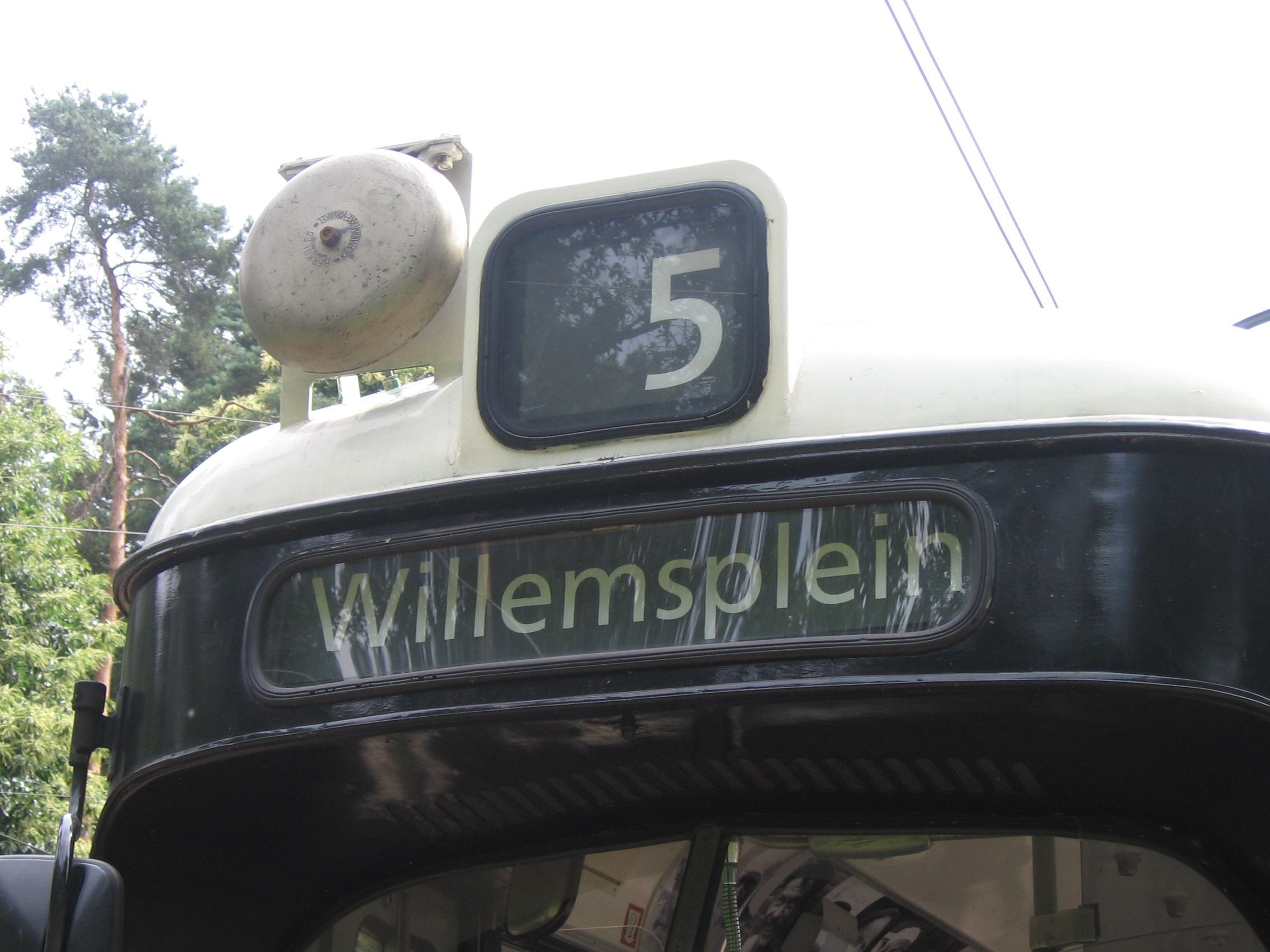 Rotterdamse tramlijn 5. Gelede wagen RET 631 in het Nederlands openluchtmuseum te Arnhem.